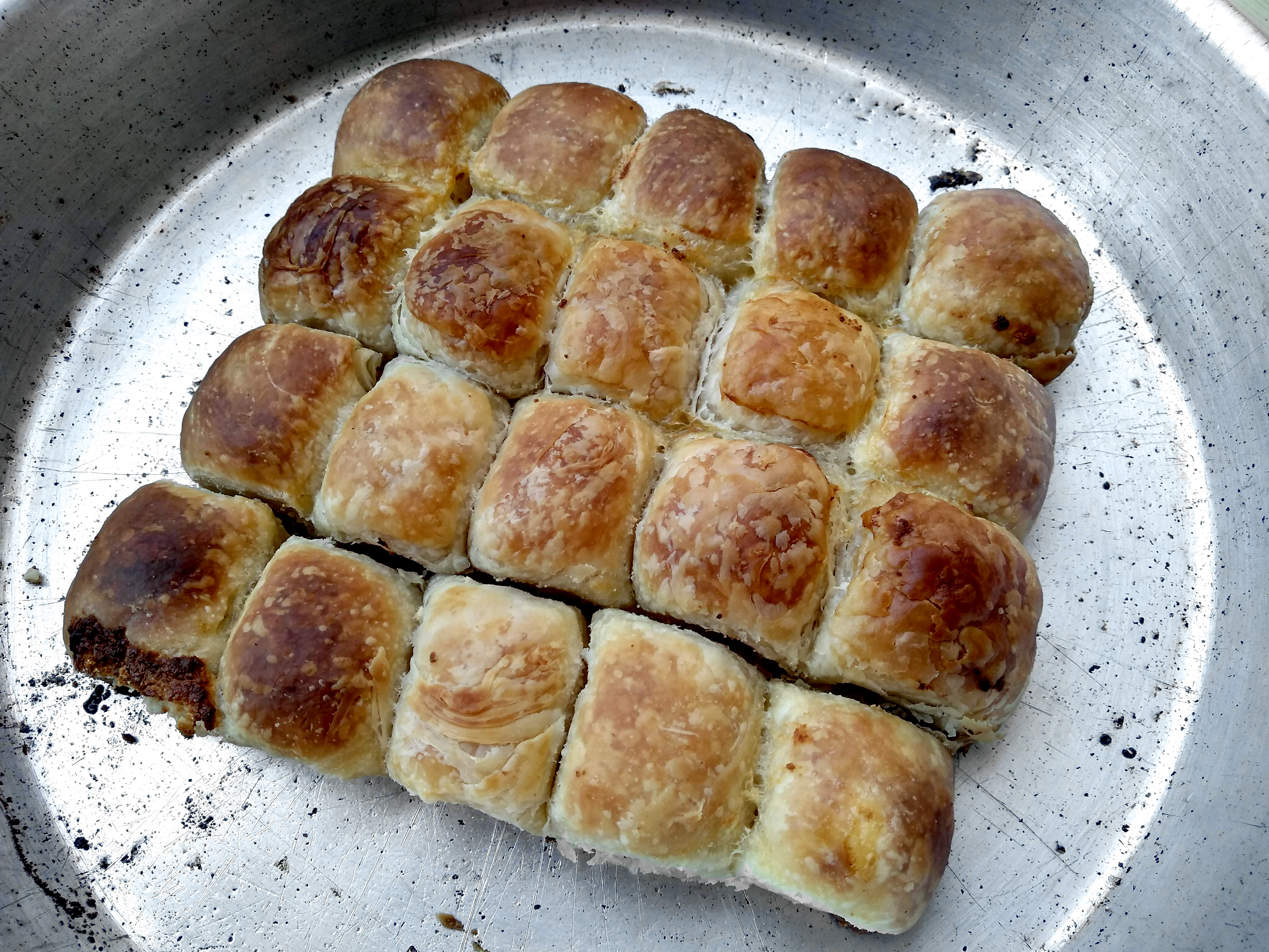 Srpski (latinica): Pazarske mantije - tradicionalno jelo i specijalitet Novog Pazara i Sandžaka